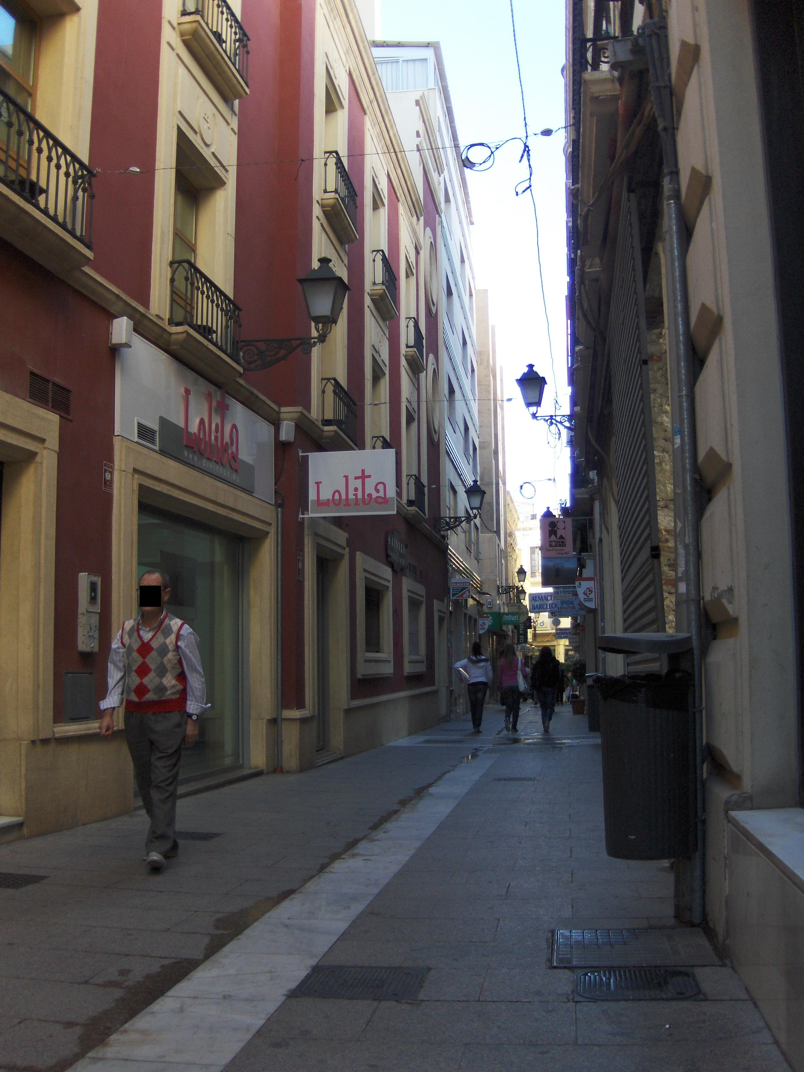 Calle las Tiendas de Almería